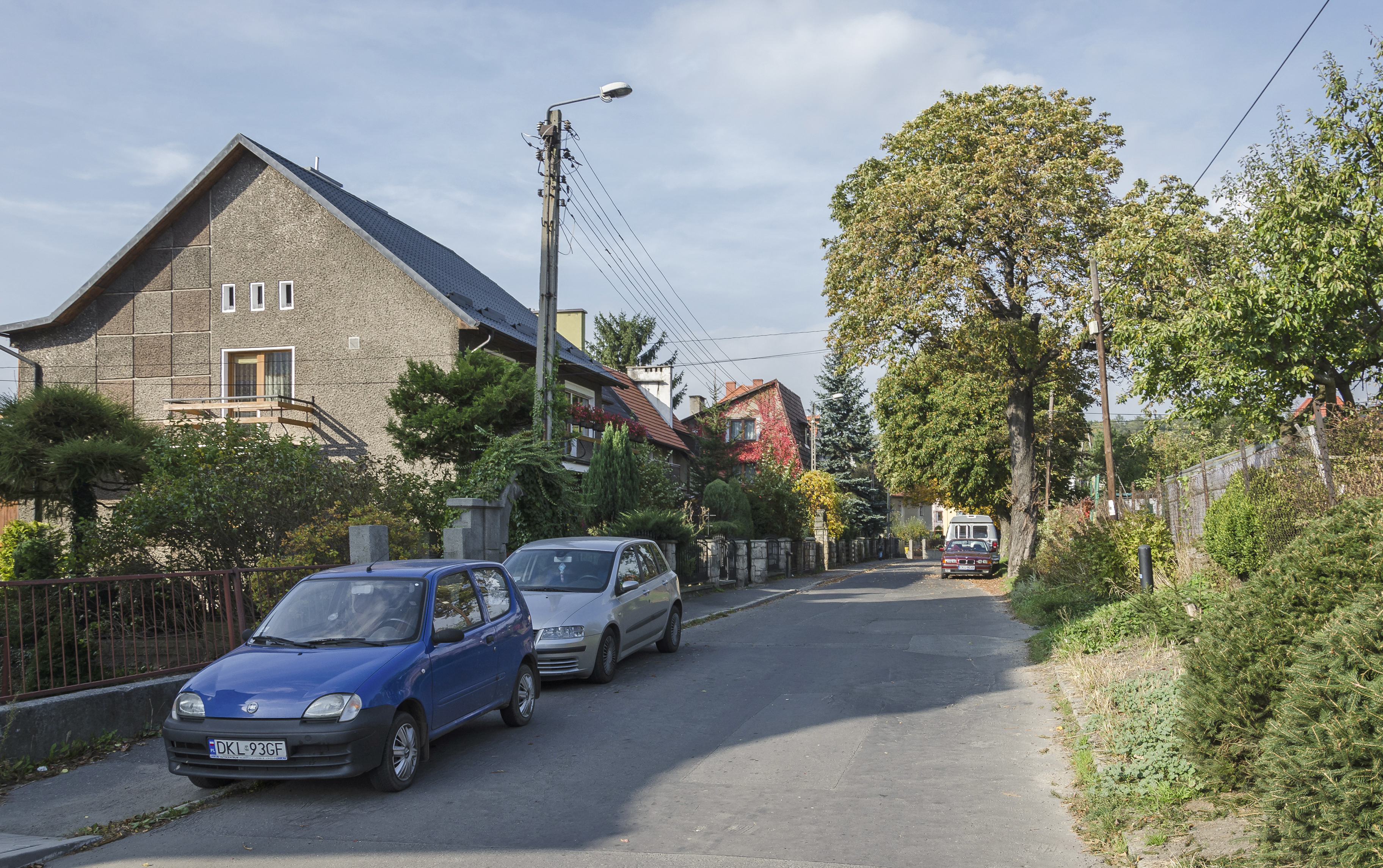 Kłodzko, ul. Reja